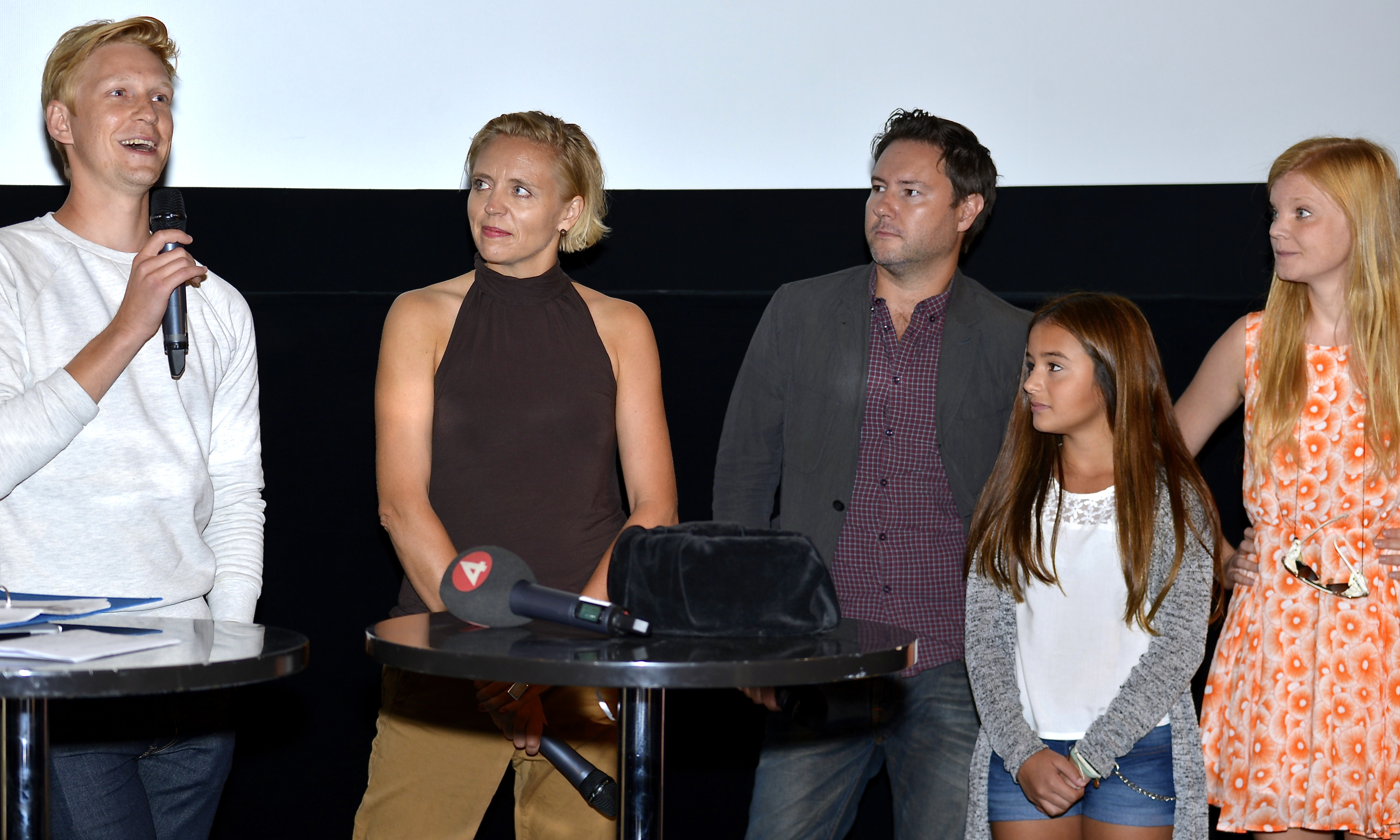 Presentationen av Krakel Spektakel i Filmhuset i Stockholm den 18 augusti 2014. Från vänster Anton Lundqvist, Elisabet Gustafsson, Ulf Synnerholm, Lea Stojanov och Lina Ljungqvist.